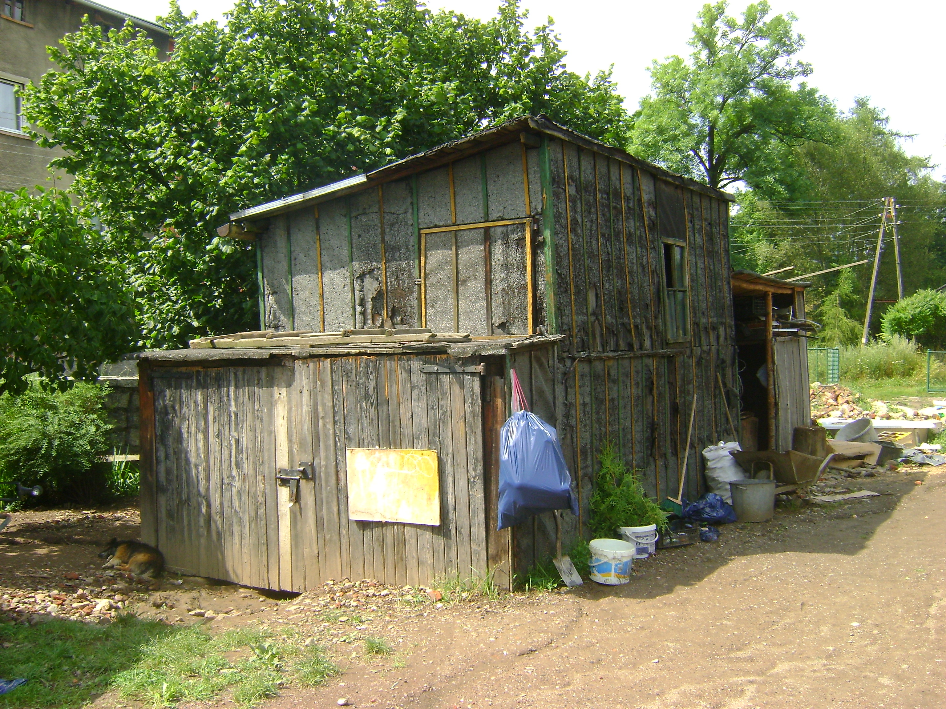 Pomocnicze pomieszczenie gospodarcze, wykonane z drewna obite papą. Szopa znajduje się w miejscowości Jugów, w Polsce, w województwie dolnośląskim, w powiecie kłodzkim, w gminie Nowa Ruda.